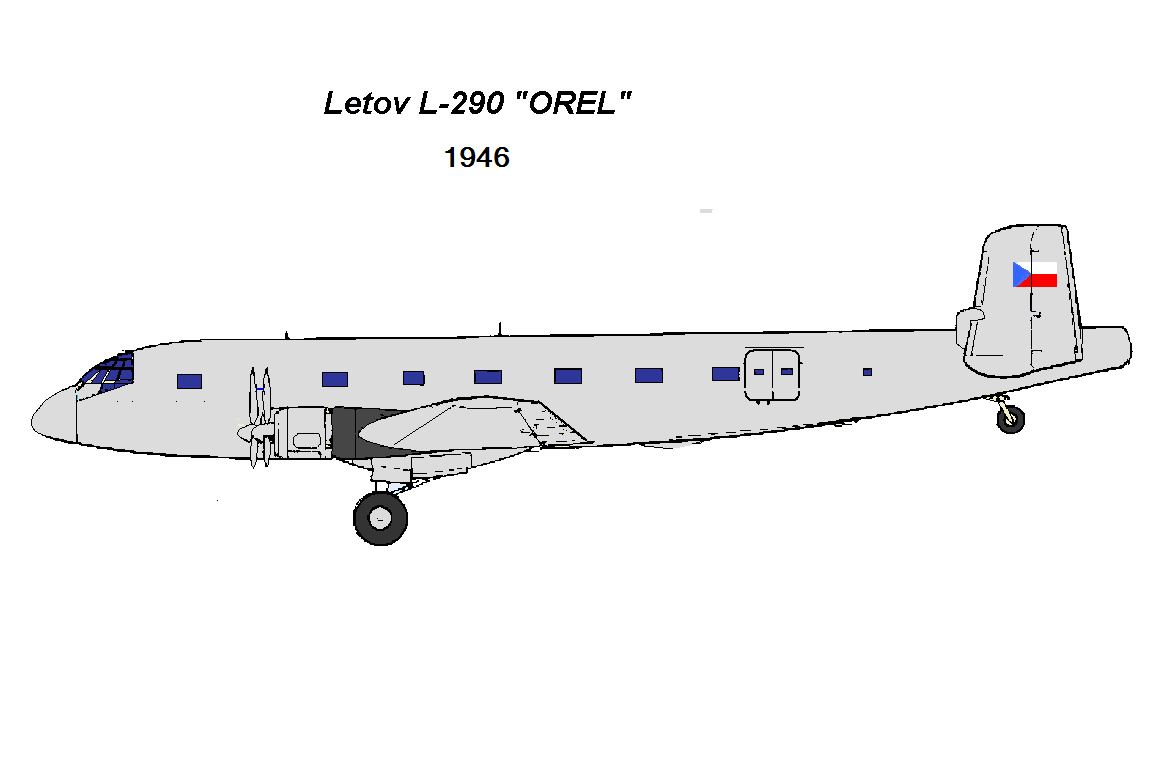 Přestavěné letadlo z Ju 290 A8 v.č. 0212 a z částí dílu z letadla Ju 290 B2 u firmy Letov na dopravní L-290 v roce 1946